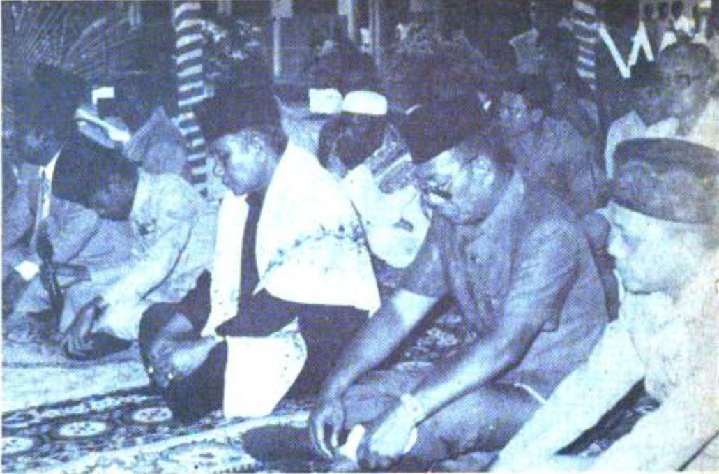 Sebelum Pengarahan: Mendagri Amirmachmud didampingi Gubernur KDH Sumatera Utara EWP Tambunan Dirjen PUOD Achmad Adnawidjaja tafakur sejenak sebelum memberi pengarahan di depan Alim Ulama.